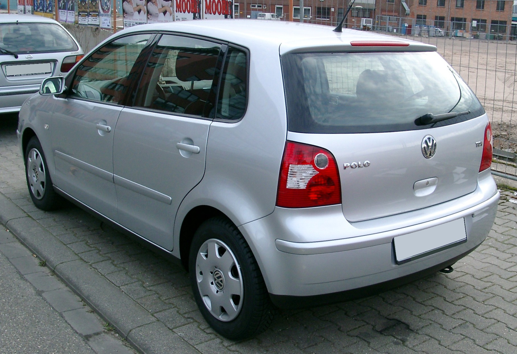 VW Polo IV